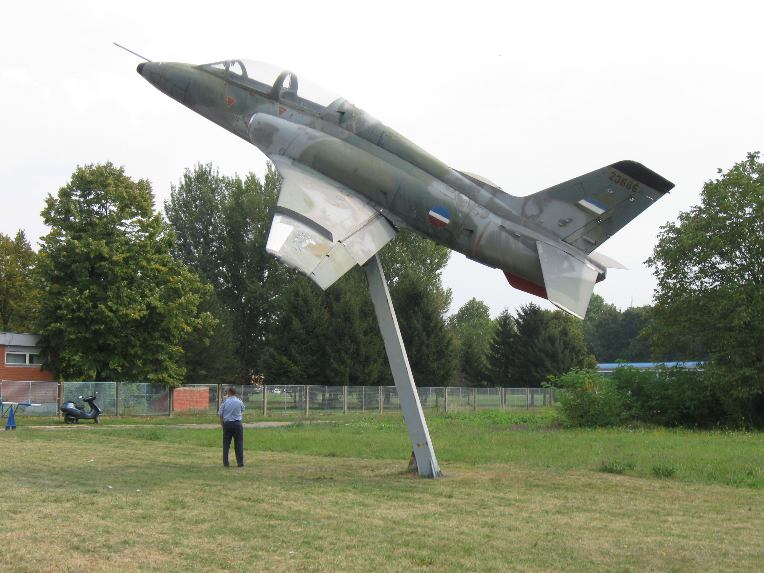 Авион Галеб Г-4 изложен на улазу у Аеродром Батајница, намењена чланку о Аеродрому. Творац слике је SmirnofLeary и предаје је у јавно власништво. Слика је направена 13. септембра 2009. године на аеромитингу у Батајници.